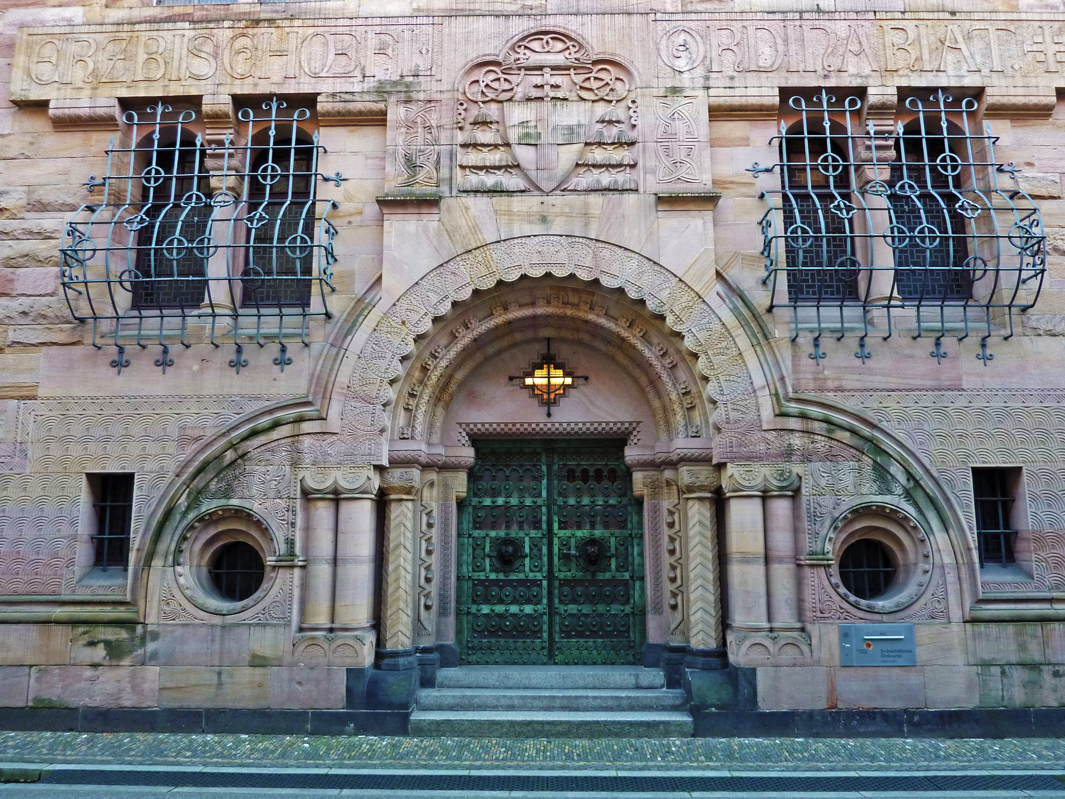 Erzbischöfliches Ordinariat Freiburg - Eingang